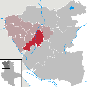 Beetzendorf im Altmarkkreis Salzwedel